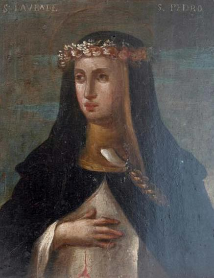 Oleo sobre tabla del siglo XVII. Colección privada